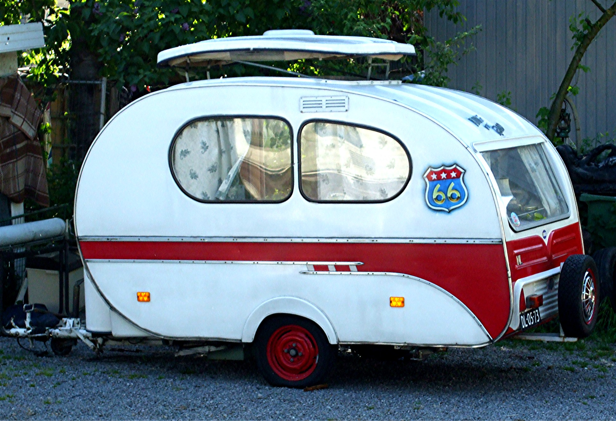 alter niederländischer Wohnwagen